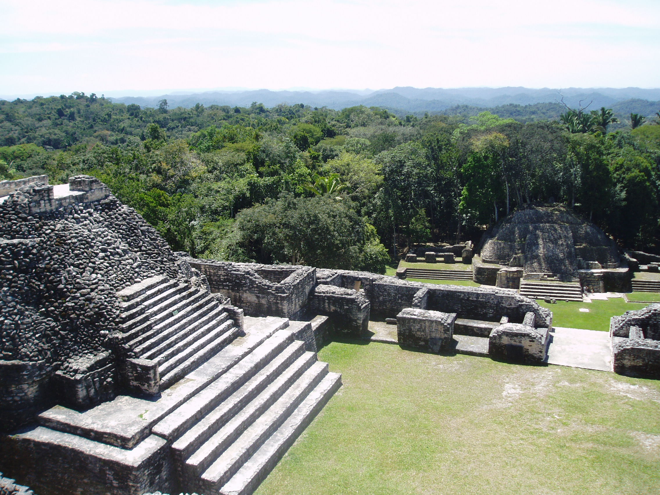 Maya-ruines van Caracol